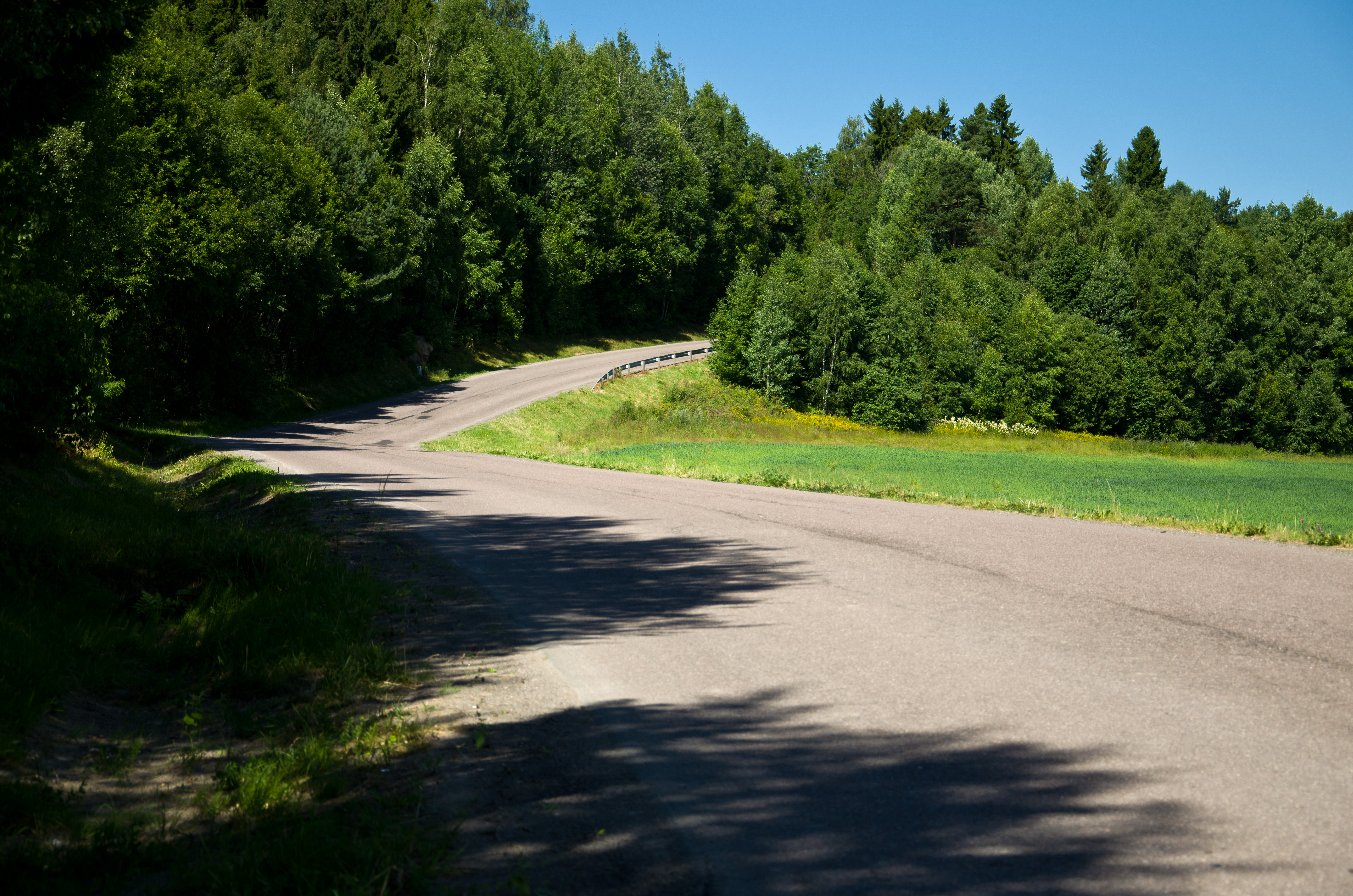 Fylkesvei 811 Kileveien i Re, Vestfold